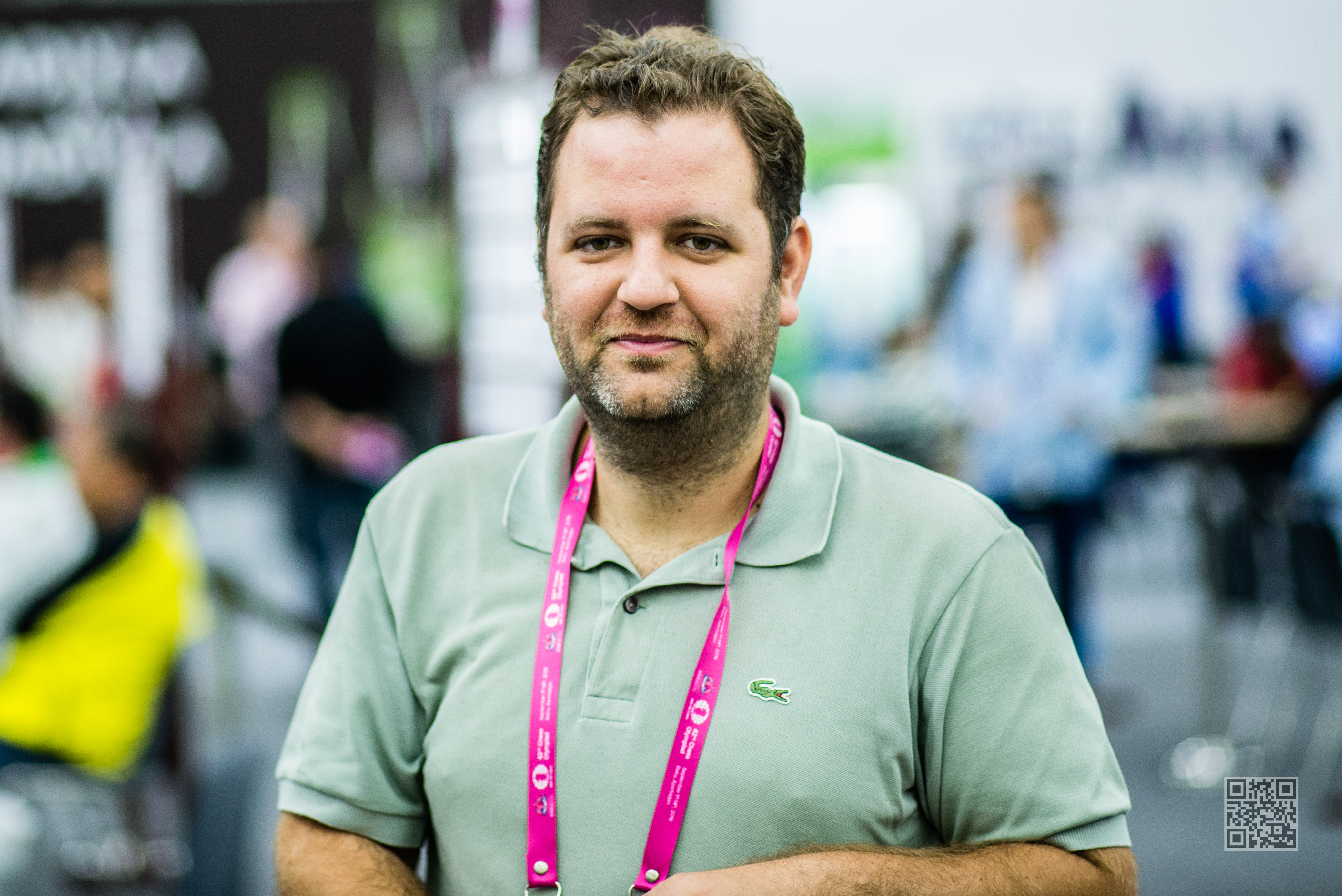 Spyros Kapnisis